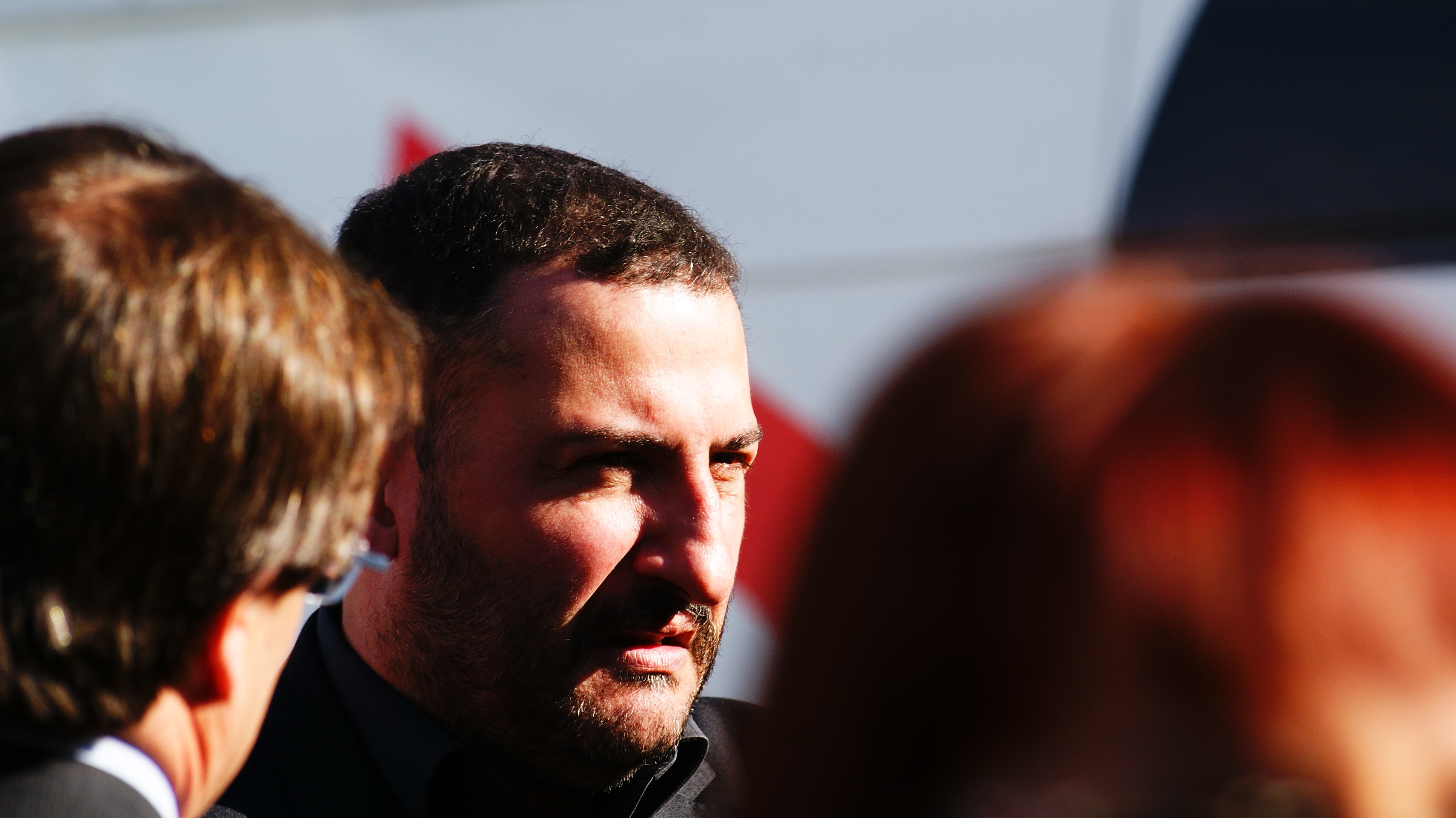 Toni Soler a l'acte de presentació dels nominats dels IV premis Gaudí de Cinema Toni Soler in the event of presentation of the nominees of the IV Gaudí Awards